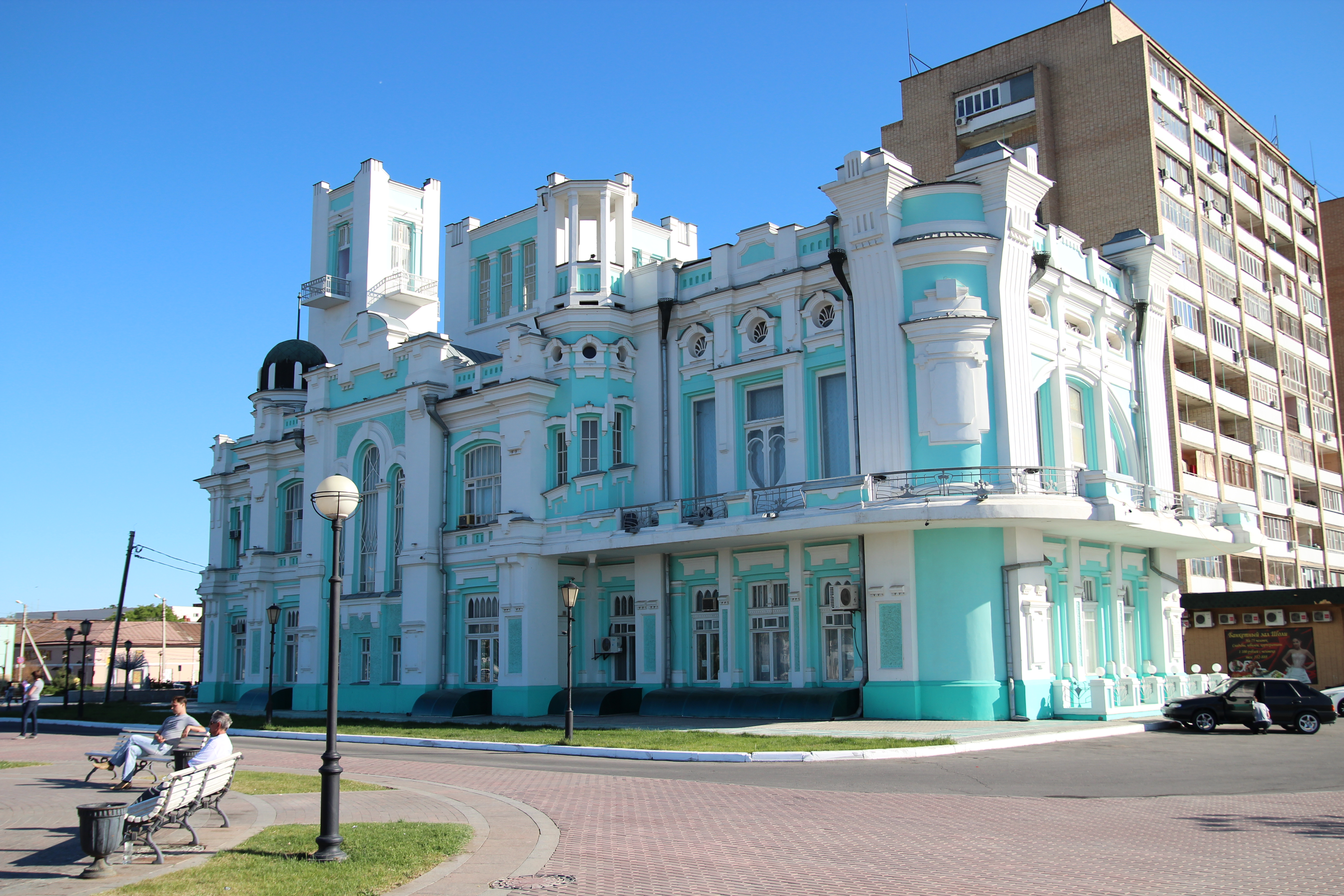 Дворец бракосочетаний Астрахани